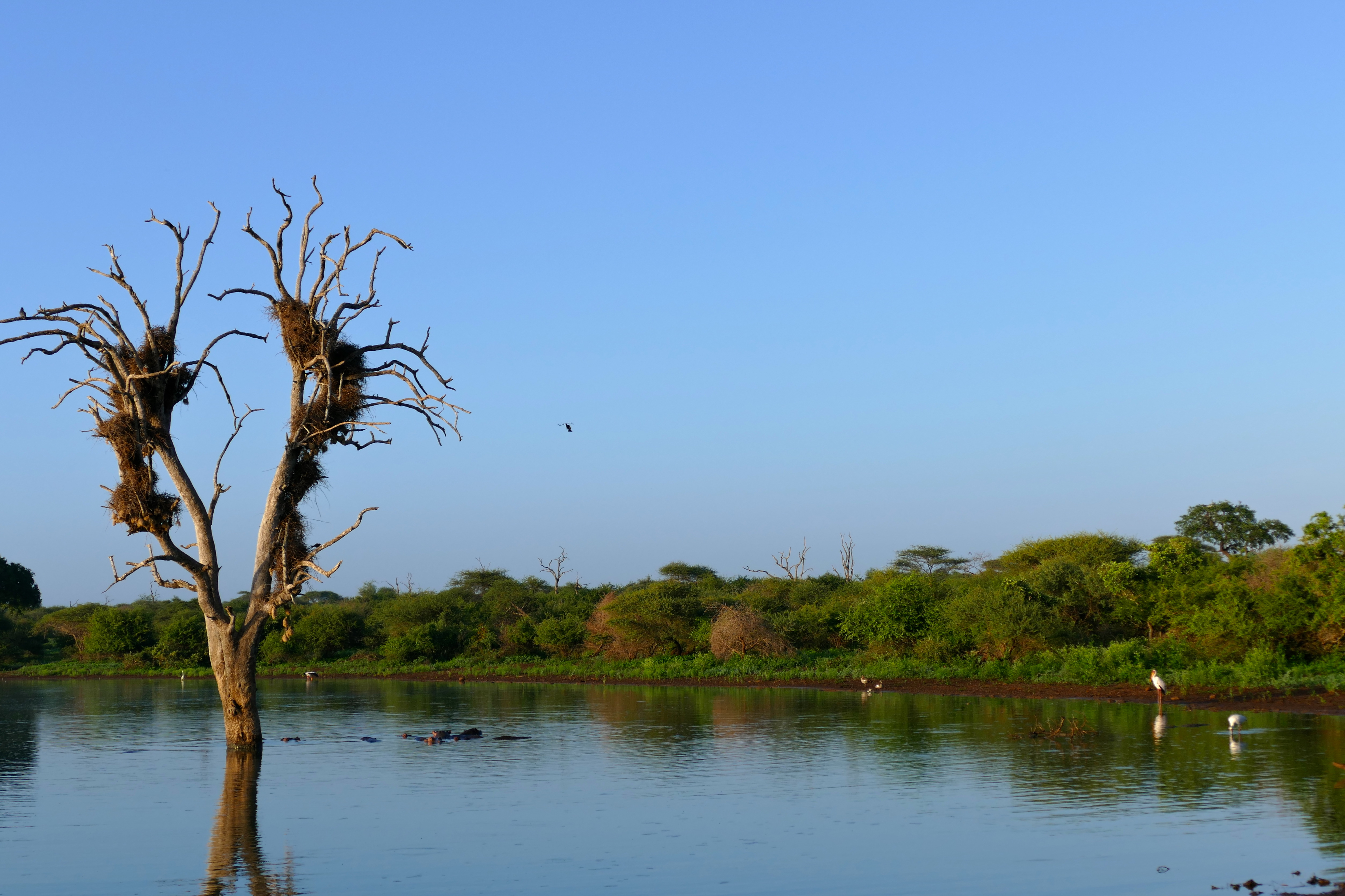 Sunset Dam, Lower Sabie, Kruger NP, SOUTH AFRICA